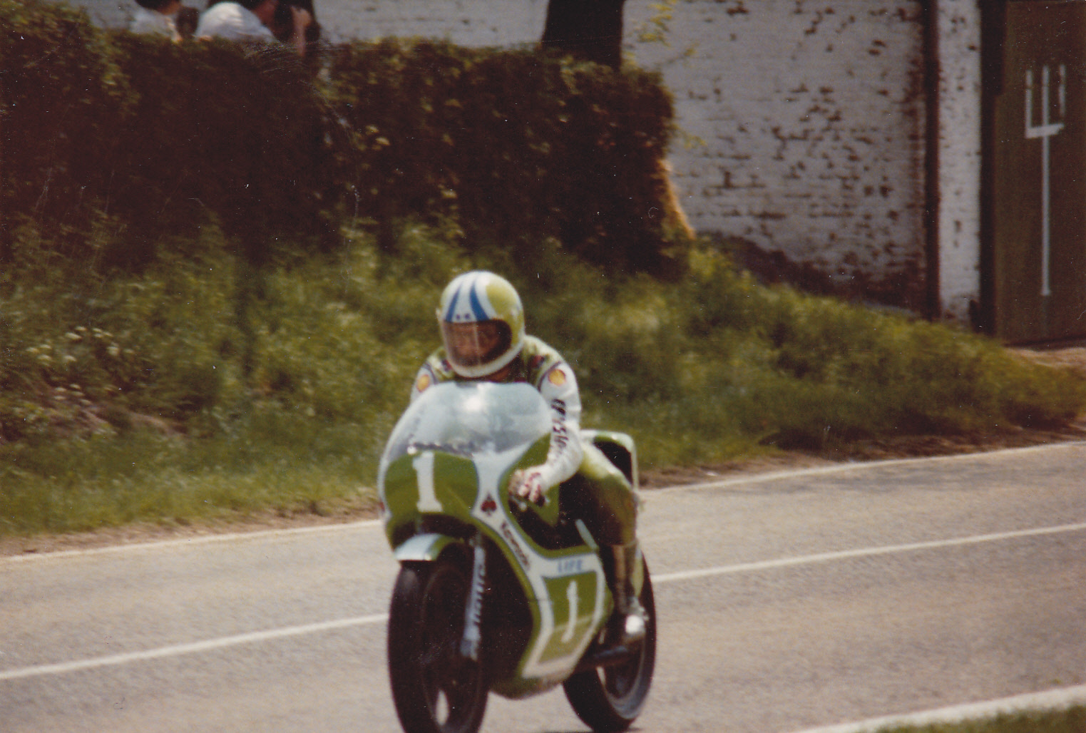 image de Ballington prise au Grand-prix de Chimay en Belgique en mai 1978